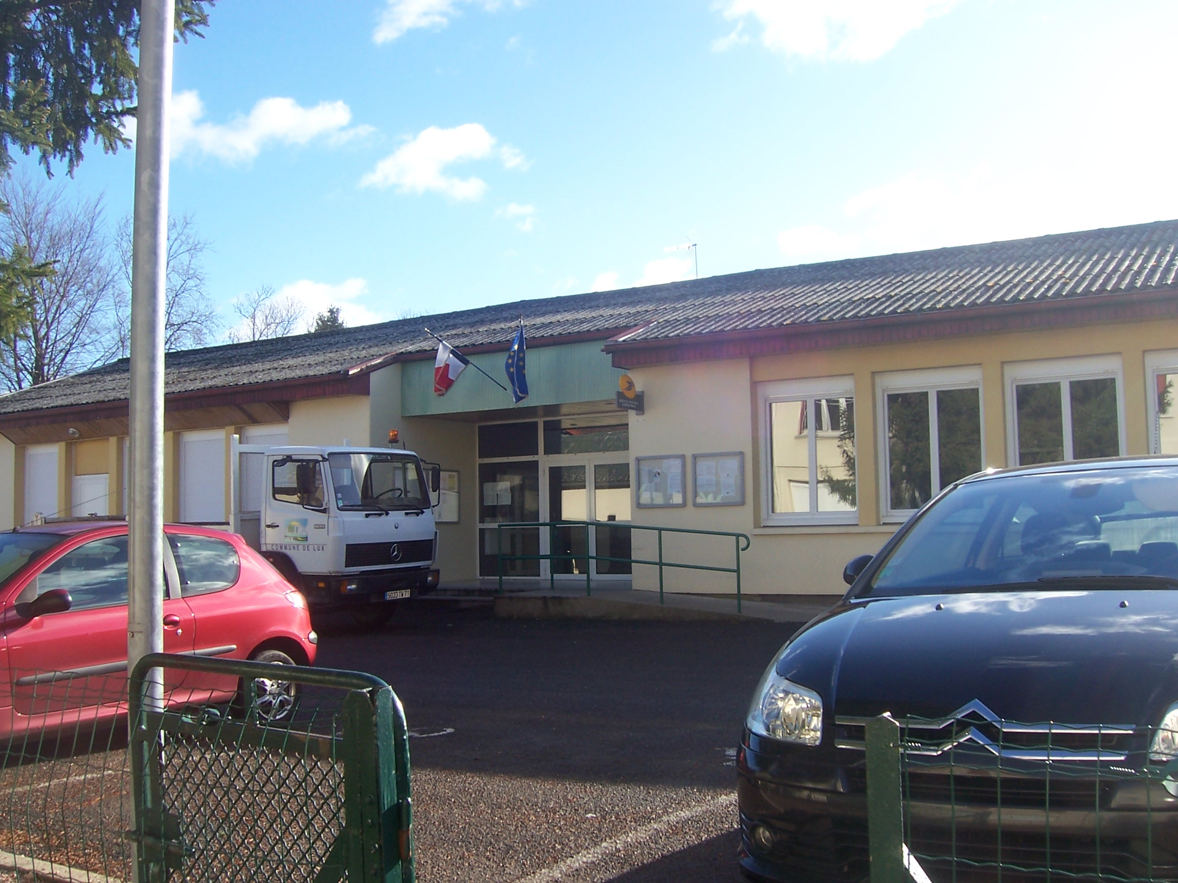 Lux Mairie